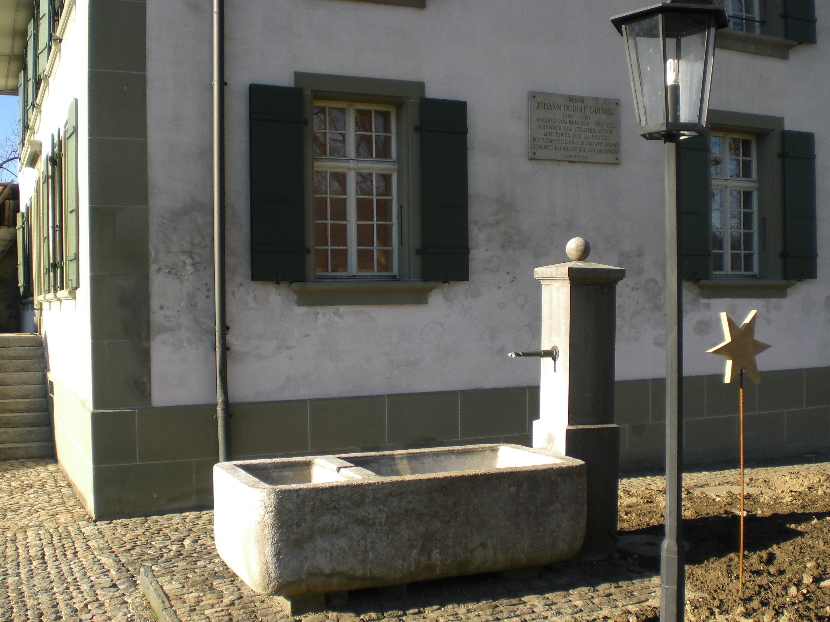 Burgdorf BE, Pfarrhaus der Stadtkirche mit Gedenktafel an Johann Rudolf Gruner.